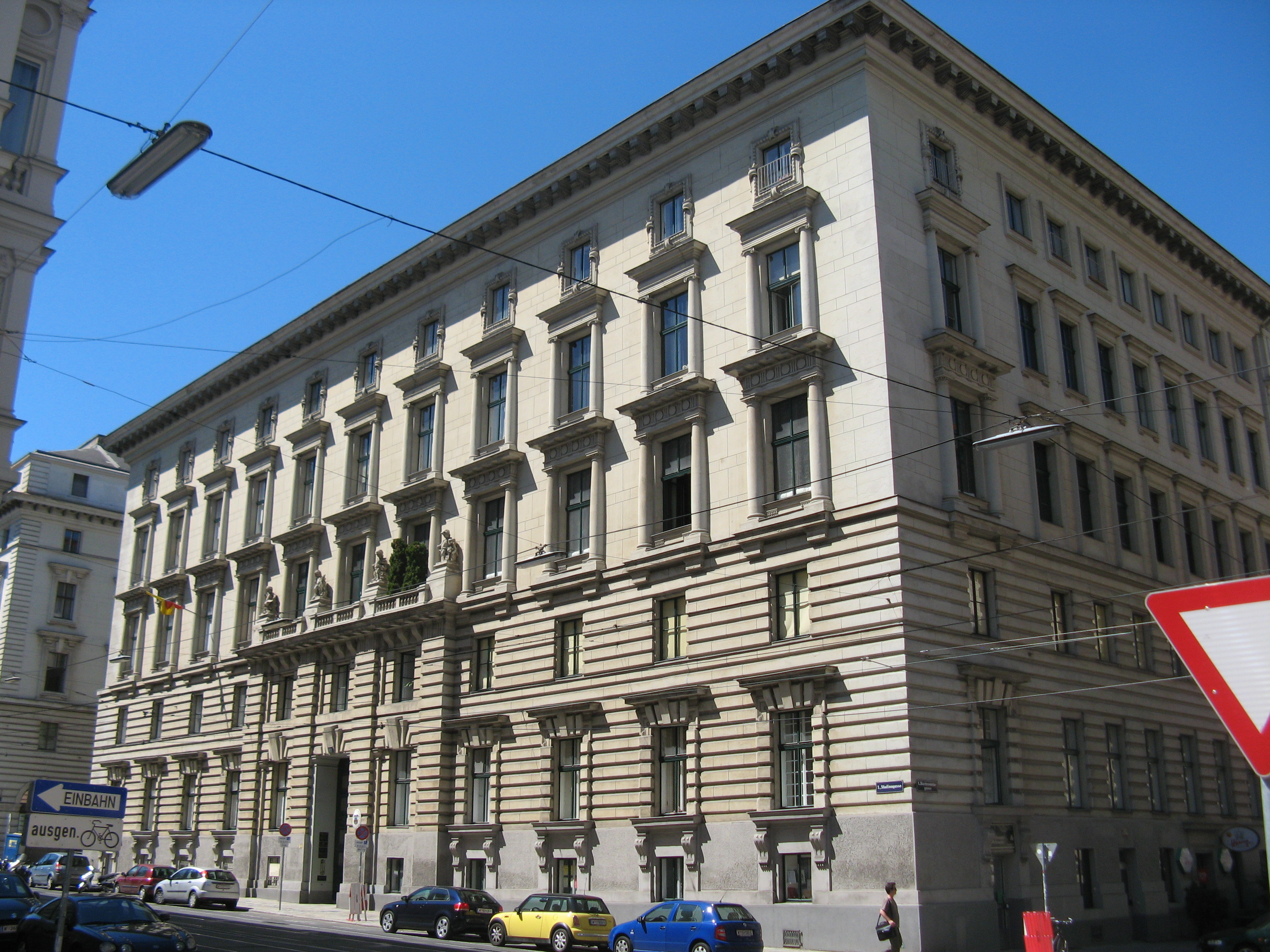 Haus (1882-1883) von Otto Wagner, Stadiongasse 6-8, Wien-Innere Stadt